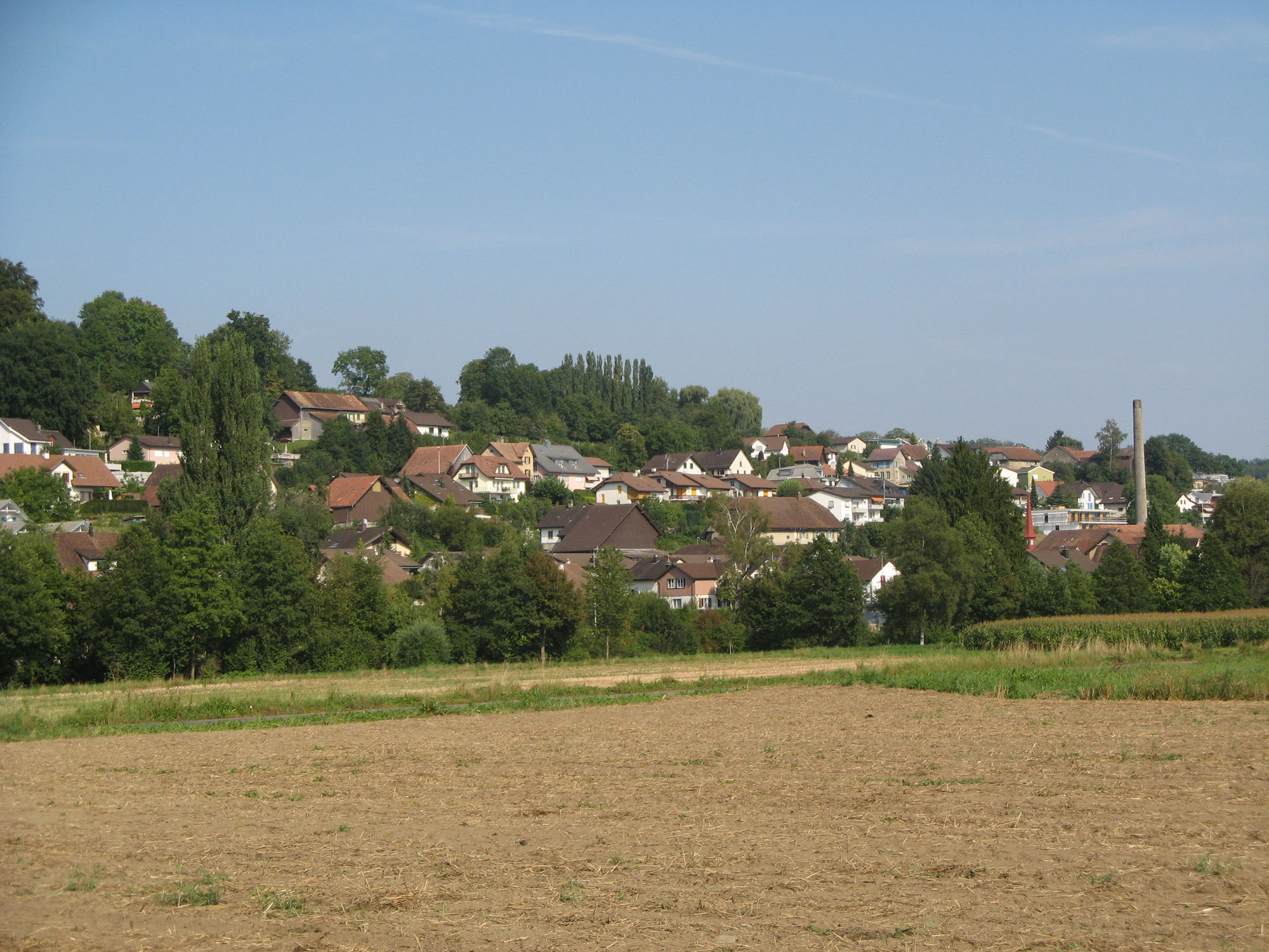 Anglikon, Ortsteil von Wohlen